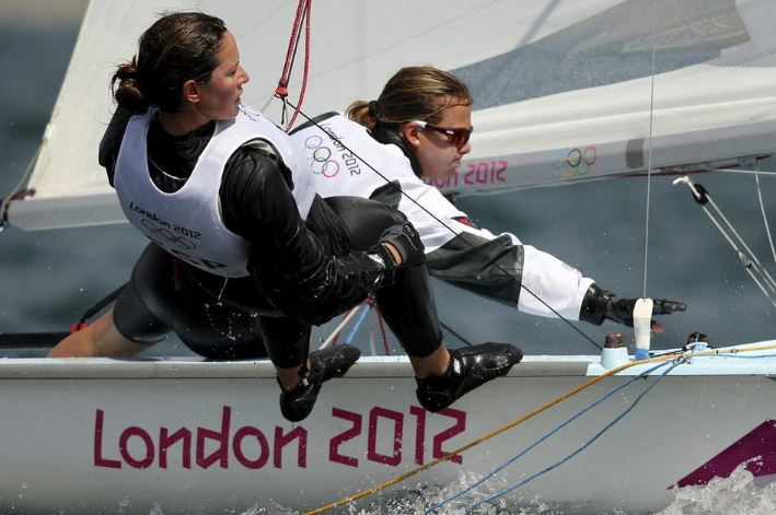 Equipo español en los Juegos Olímpicos de Londres 2012 formado por Berta Betanzos y Tara Pacheco, clase 470.